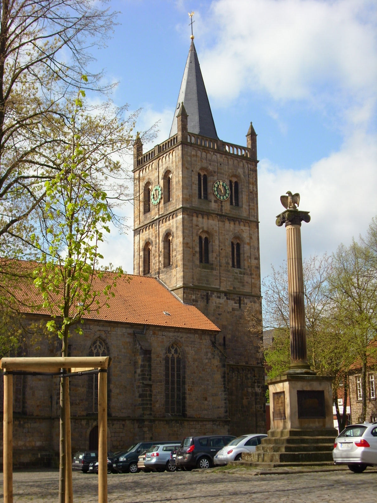 Ansicht der Christuskirche (Ibbenbüren) vom Kirchhof aus gesehen This image shows a heritage building in Germany, located in the North Rhine-Westphalian city Ibbenbüren (no. A 001).